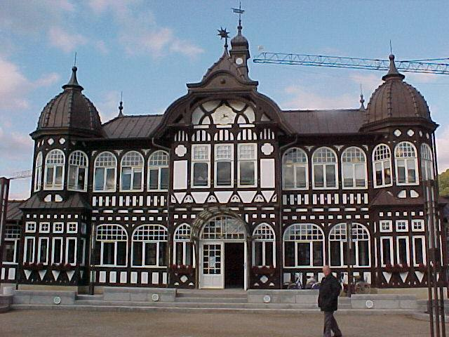 Kurhaus Bad Salzungen